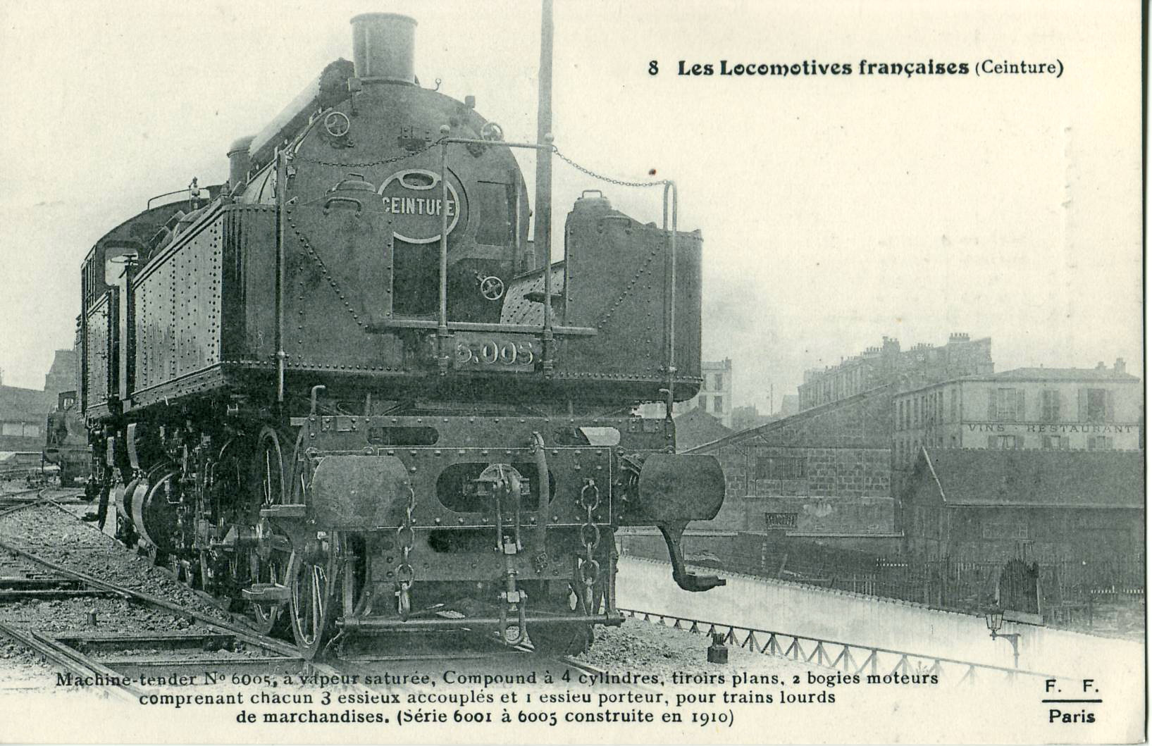 Carte postale ancienne éditée par FF (Fernand Fleury), collection Les locomotives françaises (Ceinture) n°8 : Machine-tender n°6005, à vapeur saturée, compound 4 cylindres, tiroirs plans, 2 bogies moteur comprenant chacun 3 essieux accouplés et 1 essieu porteur, pour trains lourds de marchandises (série 6001 à 6005 construite en 1910)